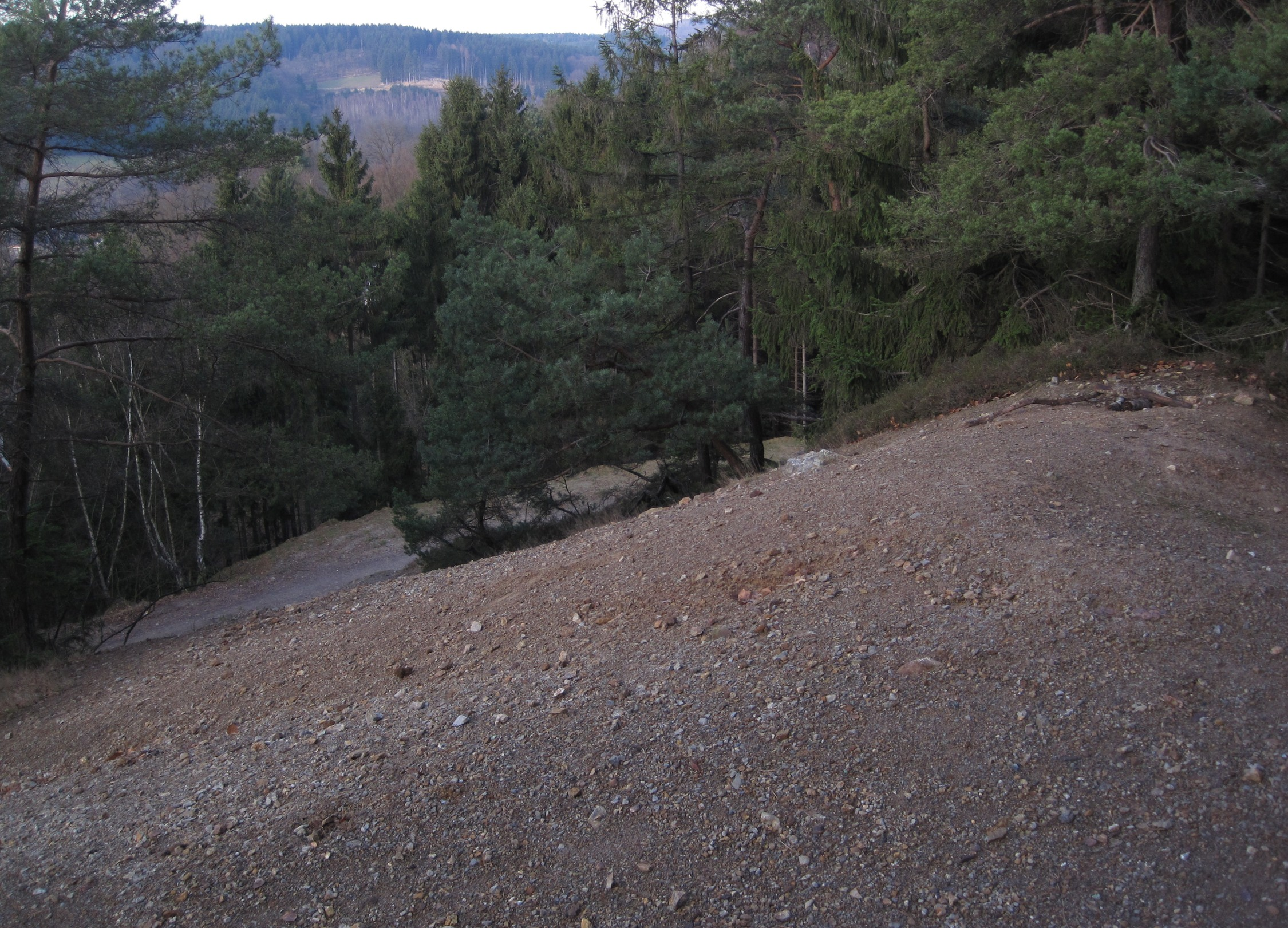 Reste der Grube Leibnitz am Lüderich.